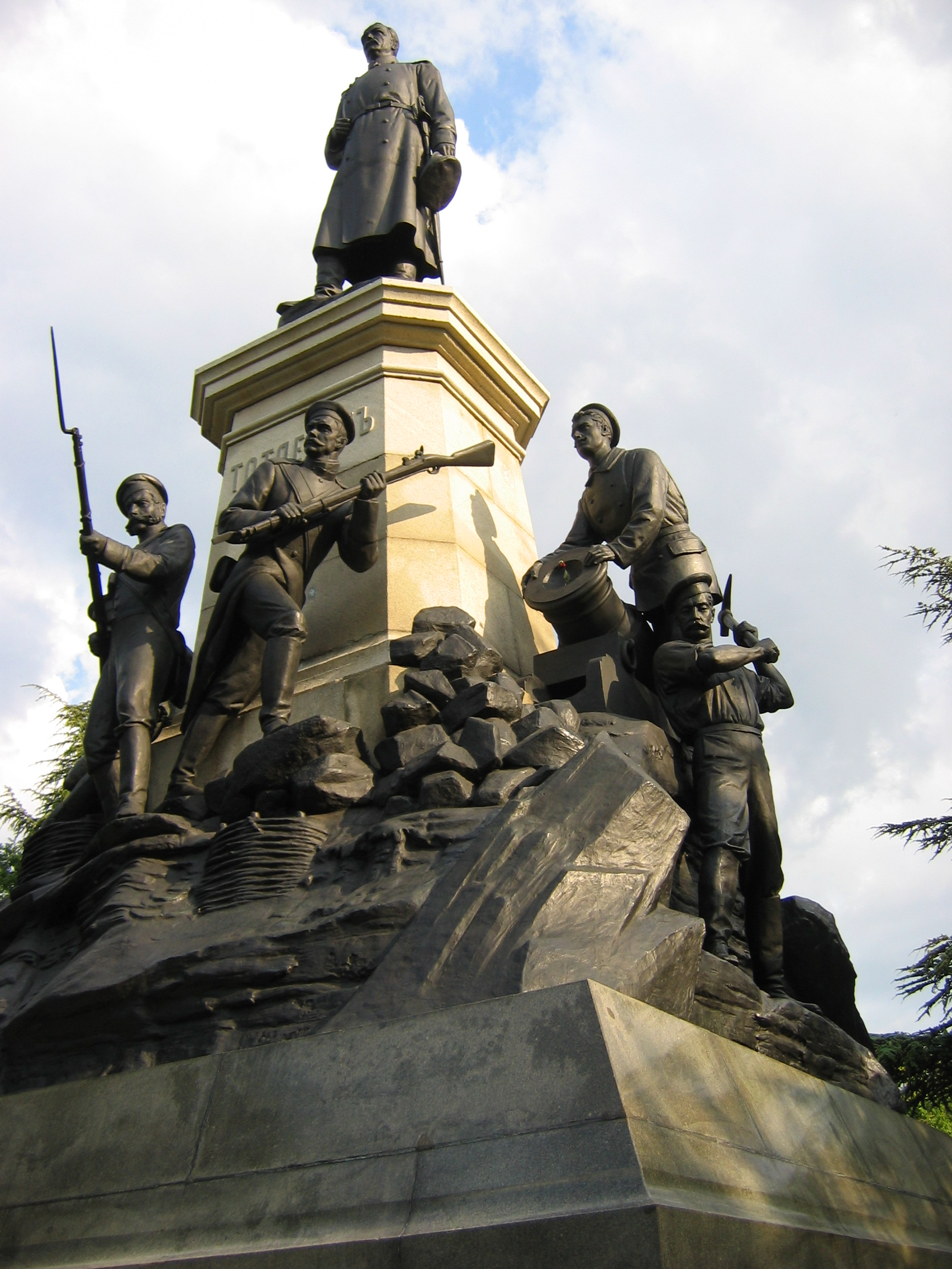 Памятник генералу Э. И. Тотлебену на Историческом бульваре в Севастополе. Создан в 1903 году, открыт 5(18) августа 1909 года, восстановлен из-за повреждений в годы ВОВ в 1945 году